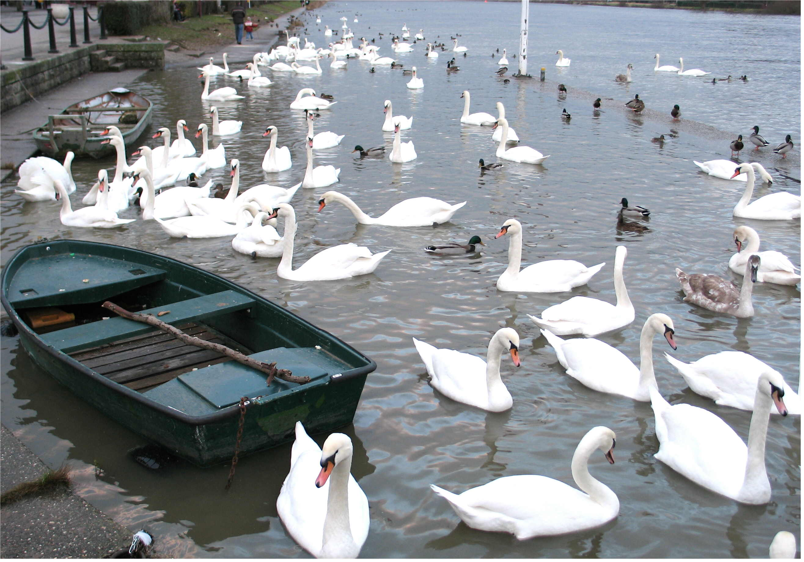 Vill Betrib zu Réimech op der Musel.